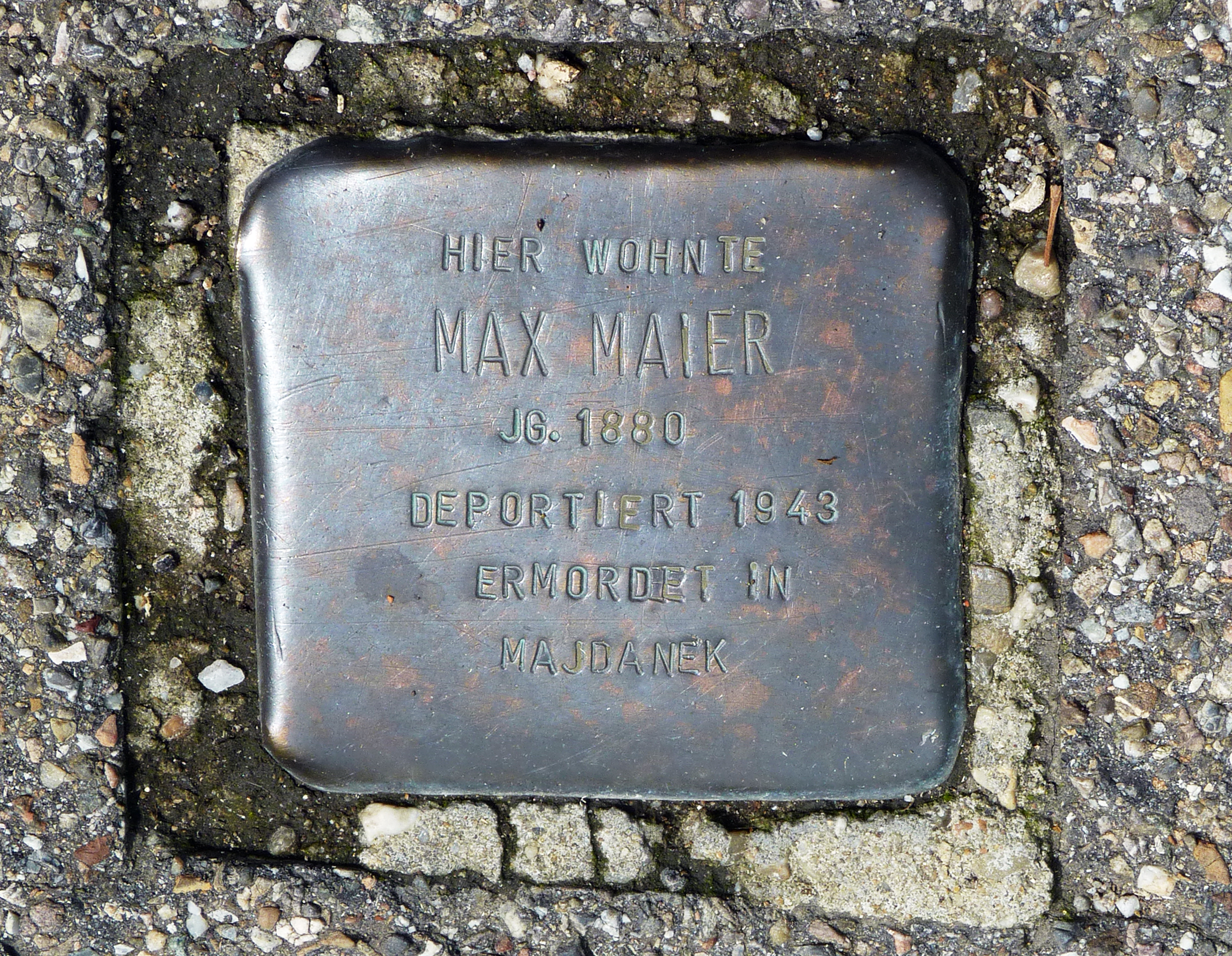 Stolperstein für Max Maier vor dem Haus Fedderstraße 6, Freiburg